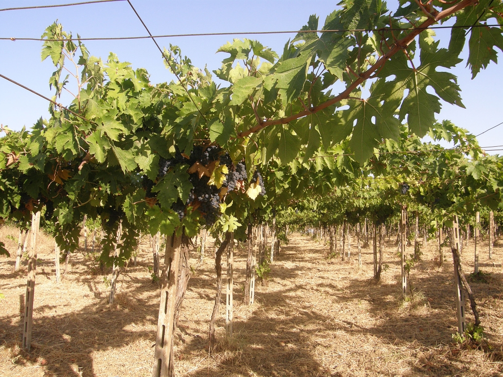 Montepulciano d'Abruzzo Centrale" in Pescara